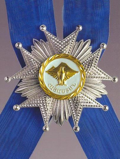 Հայաստանի Հանրապետության Պատվո շքանշան